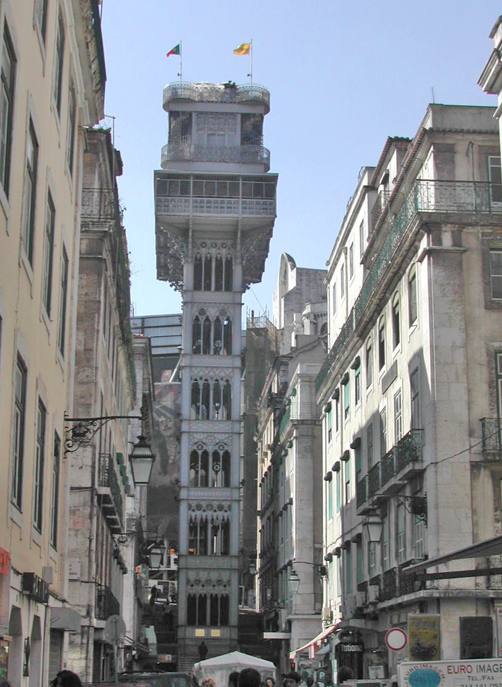 Lissabon De Santa Justa-Lift.